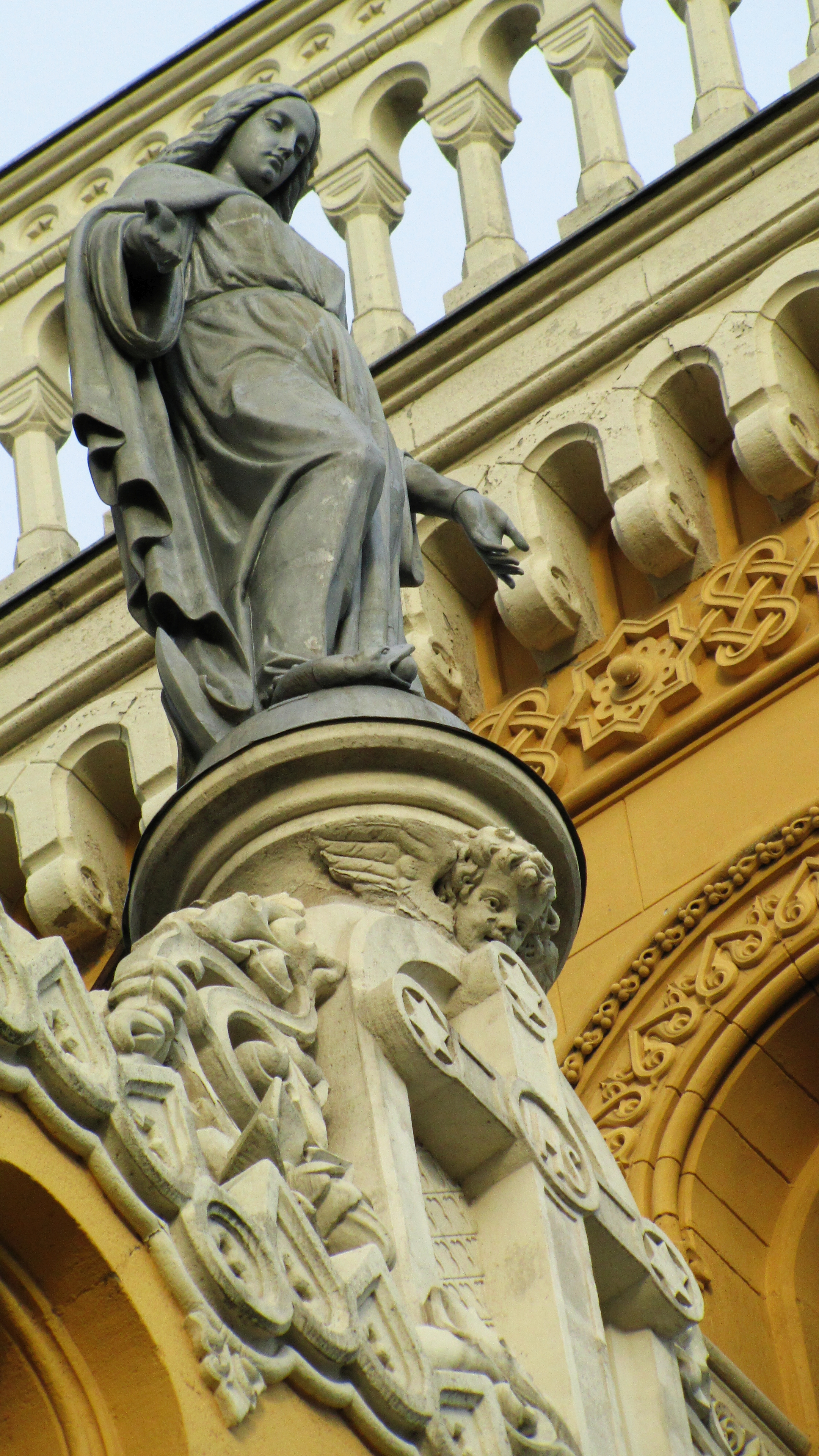 Szűz Mária szobor a fóti templom tetején